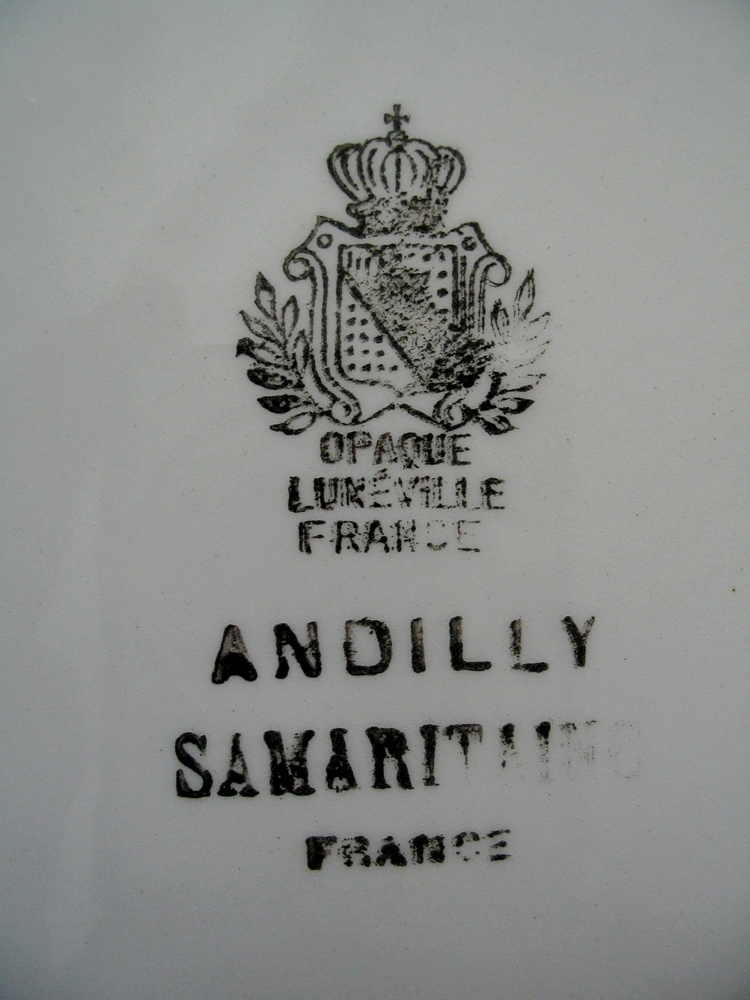 Cachet Luneville, modèle Andilly pour la Samaritaine, vers 1950